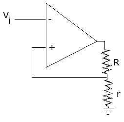 Trigger Schmitt circuit